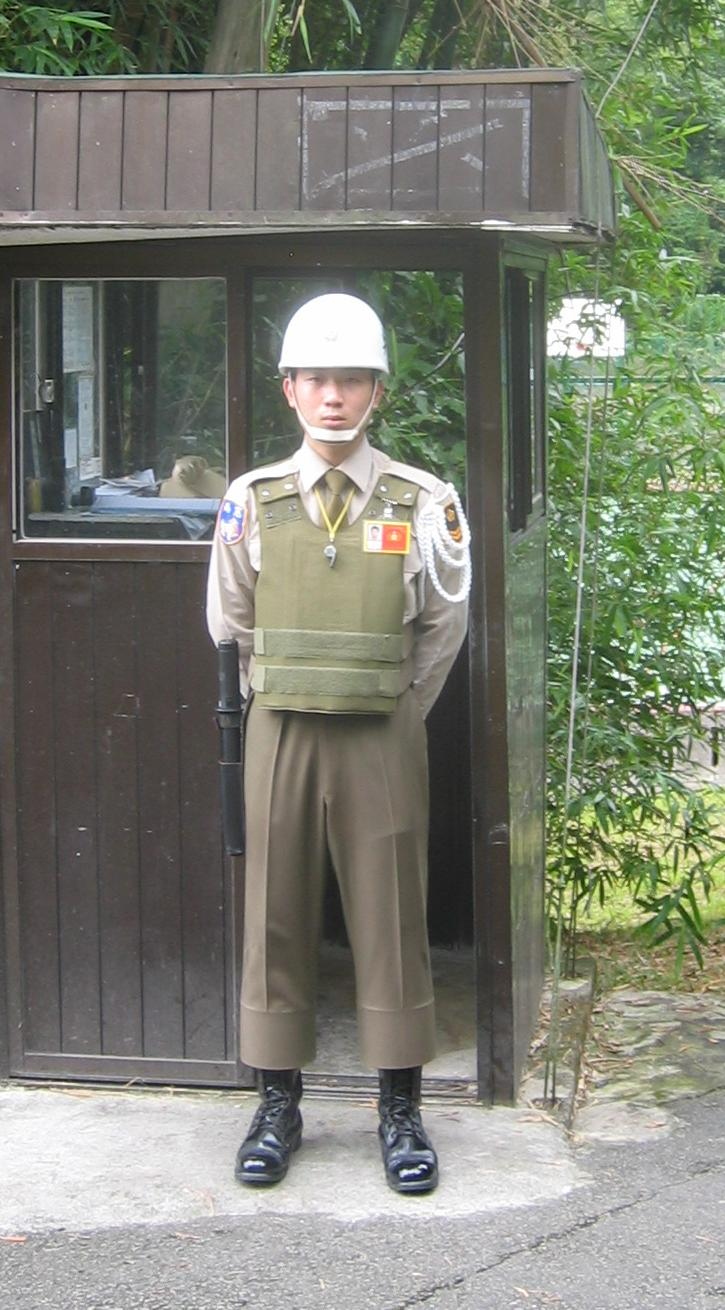 慈湖陵寢崗哨執勤，著用防彈背心與識別證的中華民國憲兵一兵。